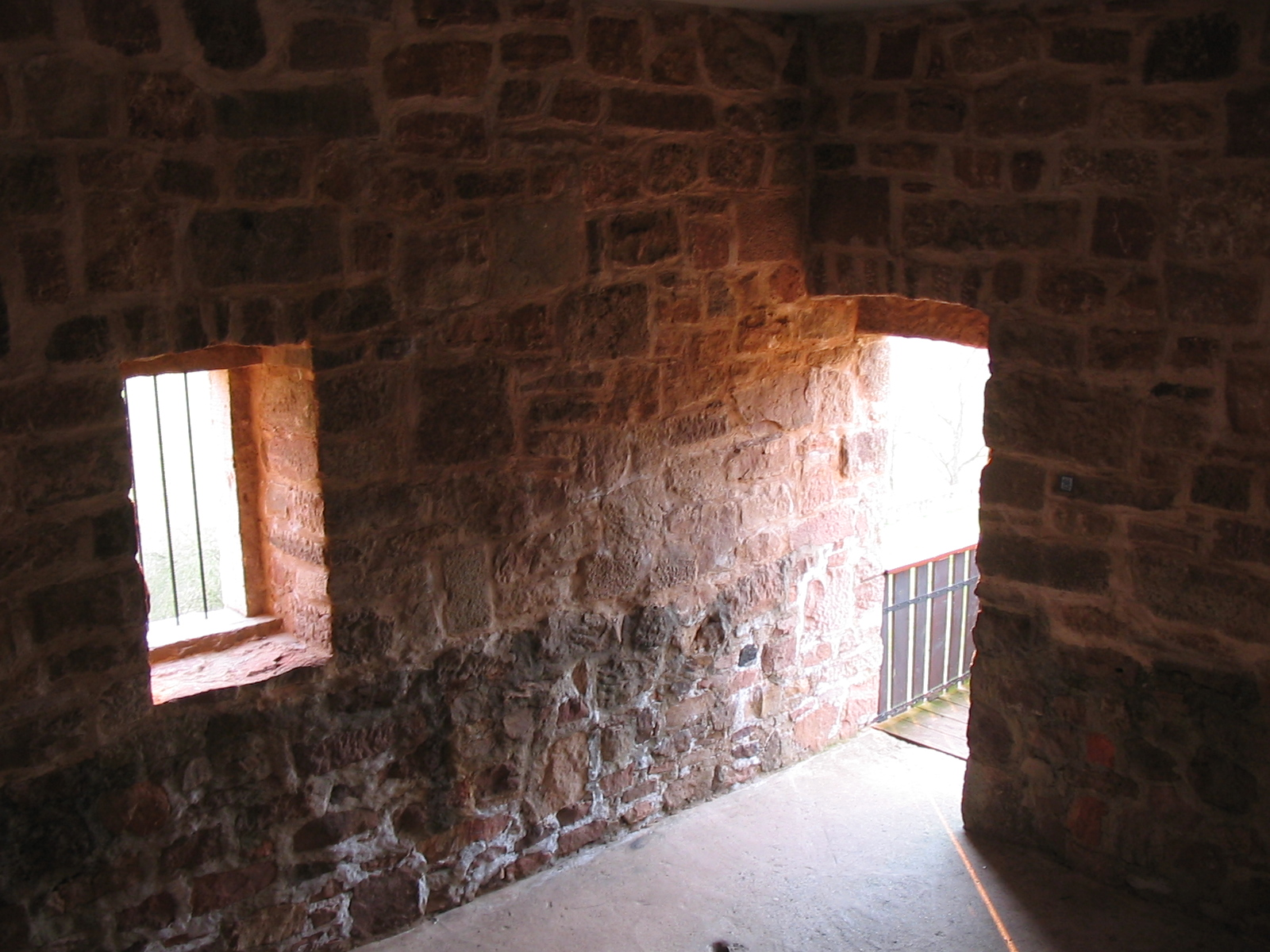 Burgruine Wartenberg. Begehbarer Innenraum des Turmes.